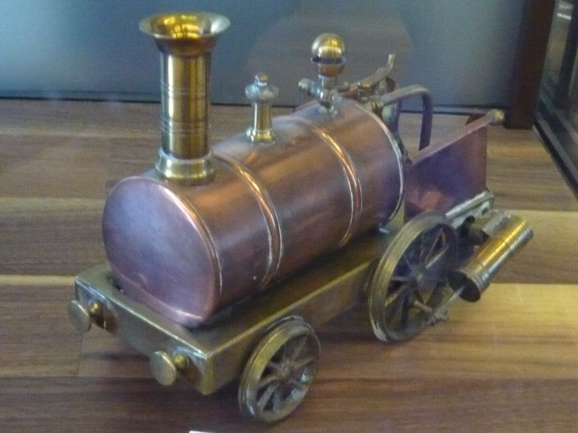 Spiritus-Dampflokomotive, Stevens Dockyard, England, um 1890, aufgenommen im Zürcher Spielzeugmuseum Native nameZürcher SpielzeugmuseumLocationZürich, SwitzerlandCoordinates47° 22′ 23″ N, 8° 32′ 23″ E Established1956WebsiteZürcher SpielzeugmuseumAuthority control : Q248517